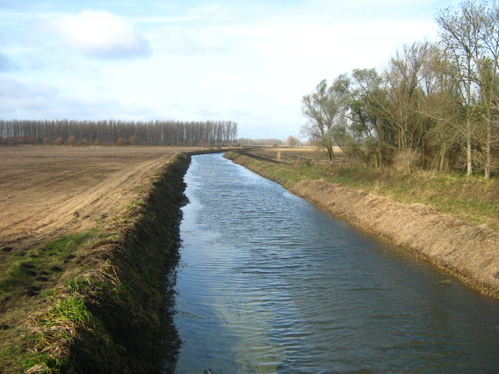 der Havelländische Grosse Hauptkanal kurz hinter Nauen im Havelländischen Luch (Landkreis Havelland, Brandenburg, Deutschland).